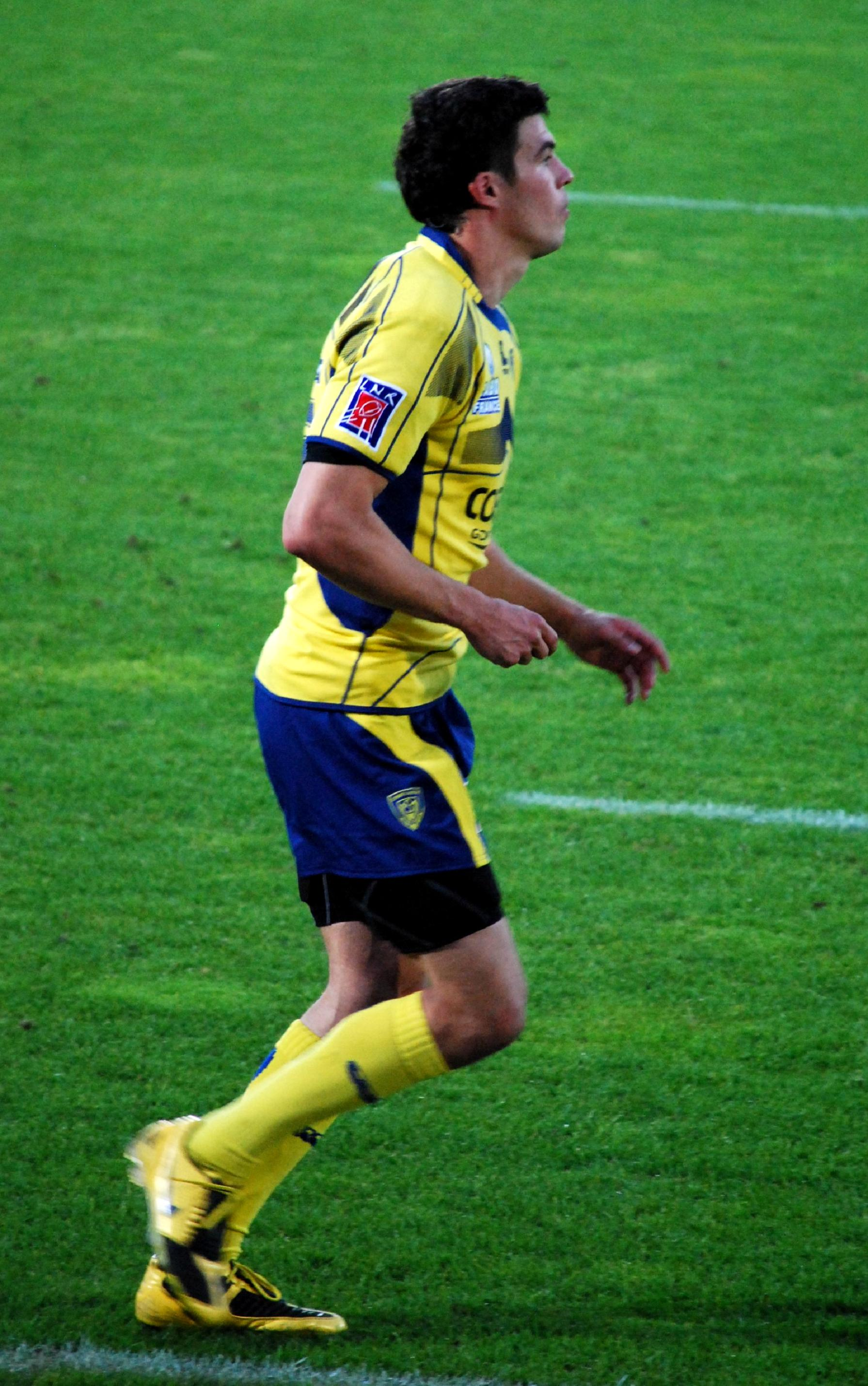 Anthony Floch lors de la demi-finale de top 14 2008-2009 opposant Clermont à Toulouse